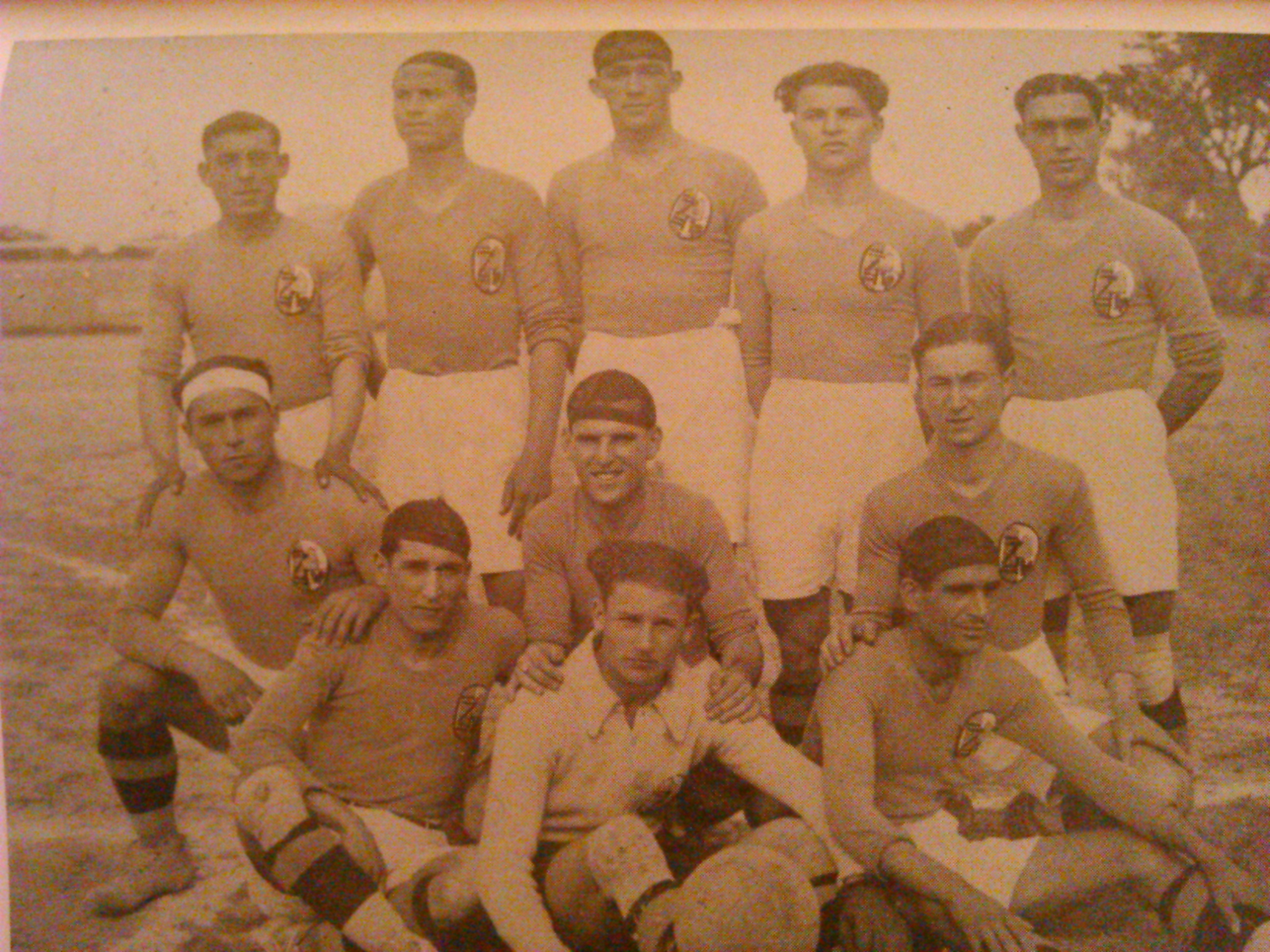 Il primo logo comparso sulle maglie del Siracusa anno 1928-29